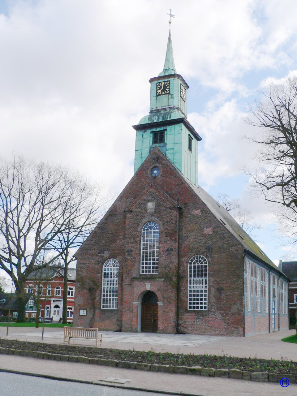 Kirche Nienstedten in Hamburg